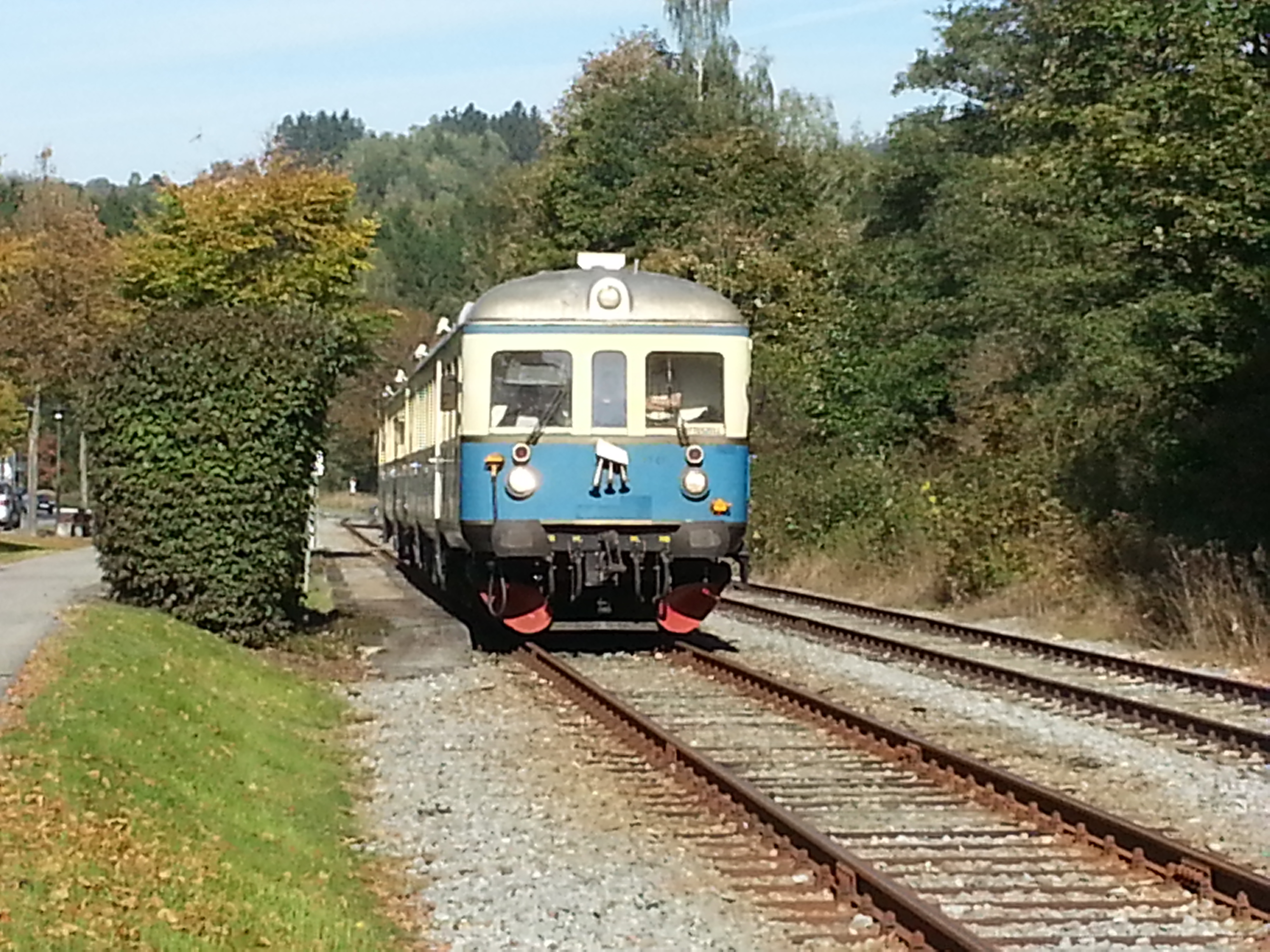 Wanderbahn im Bahnhof Teisnach am 5. Oktober 2013